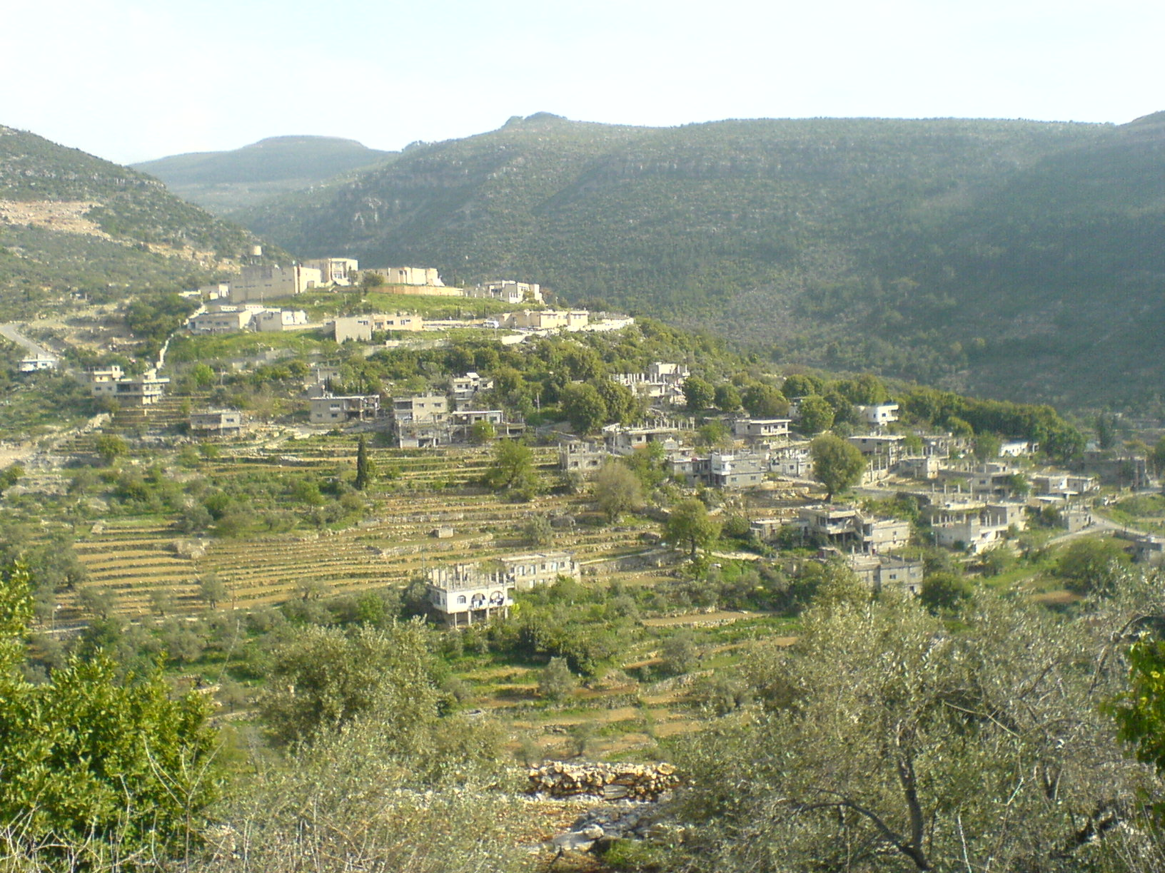 حراما في الربيع ، الصورة مأخوذة من جانب البلدية.